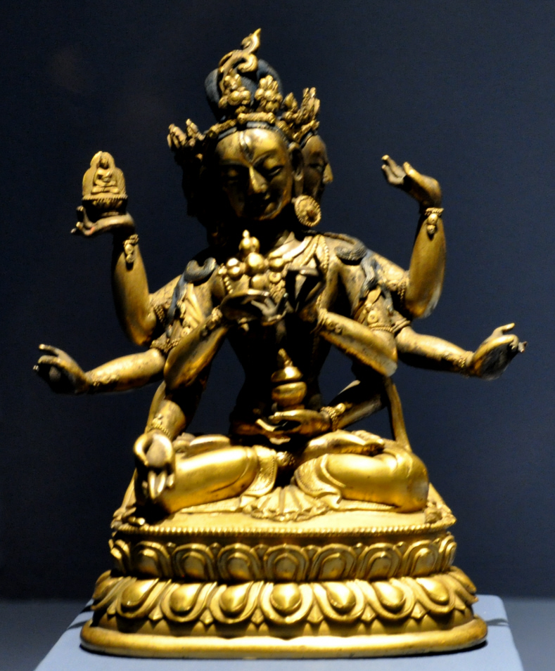 Namgyalma (die dreigesichtige „Siegreiche“ mit acht Armen); Bronzeguss, feuervergoldet; sinotibetisch,19. Jh.; Linden-Museum Stuttgart